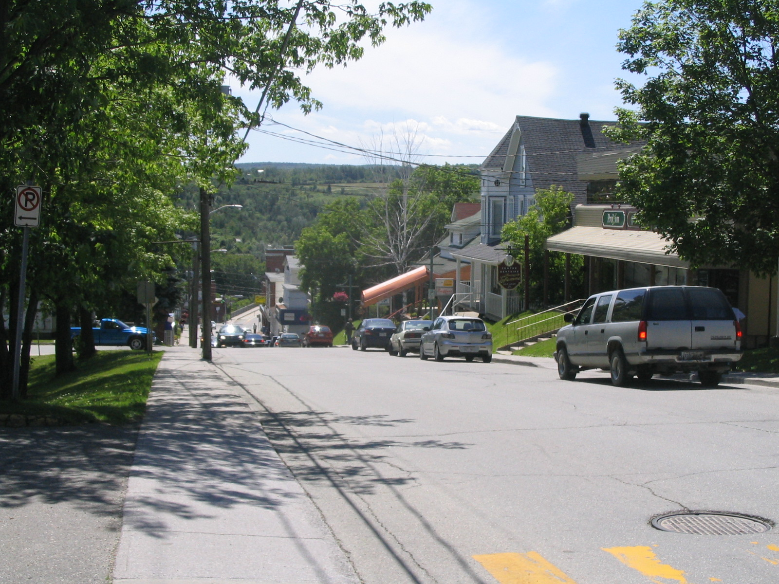 Rue St-George, Windsor, QC